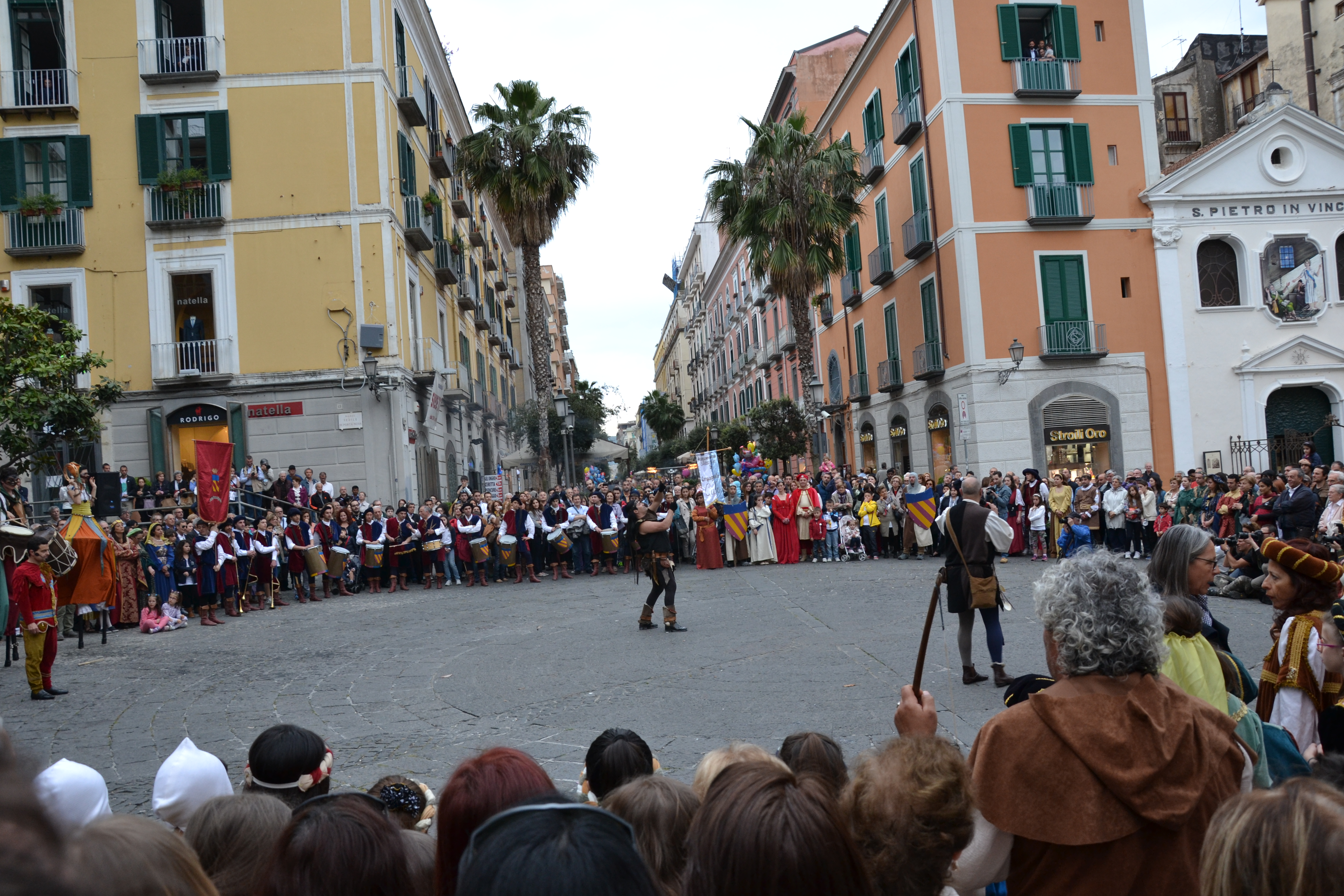 Un momento della Fiera del Crocifisso durante l'edizione 2013